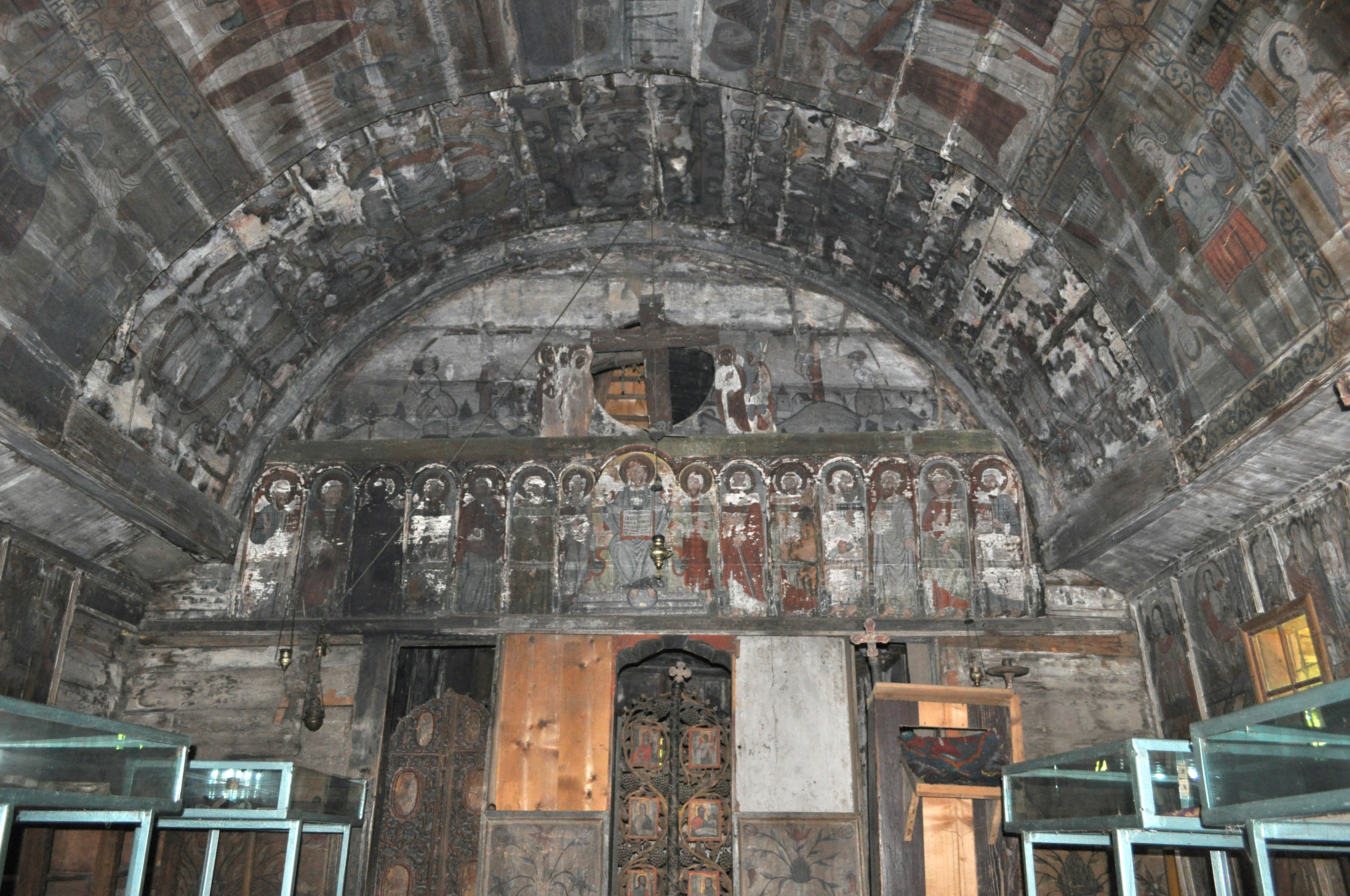 Biserica de lemn „Sfinții Arhangheli” din Băița, Mureș